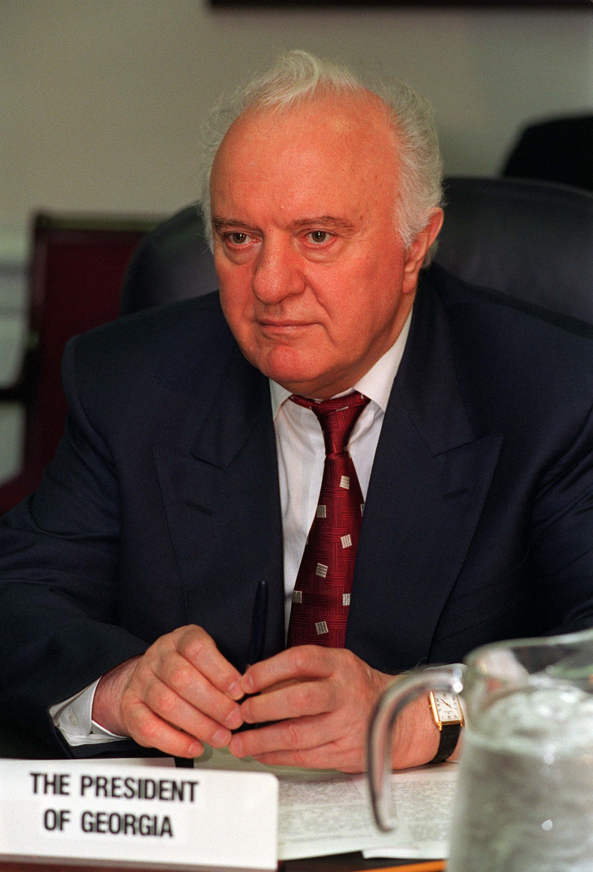 Bild Eduard Schewardnadse bei einem Treffen mit US-Verteidigungsminister William Cohen am 17. Juli 1997.